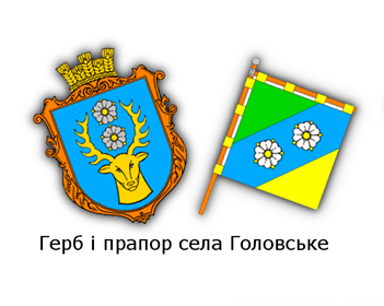 Герб і прапор села Головське